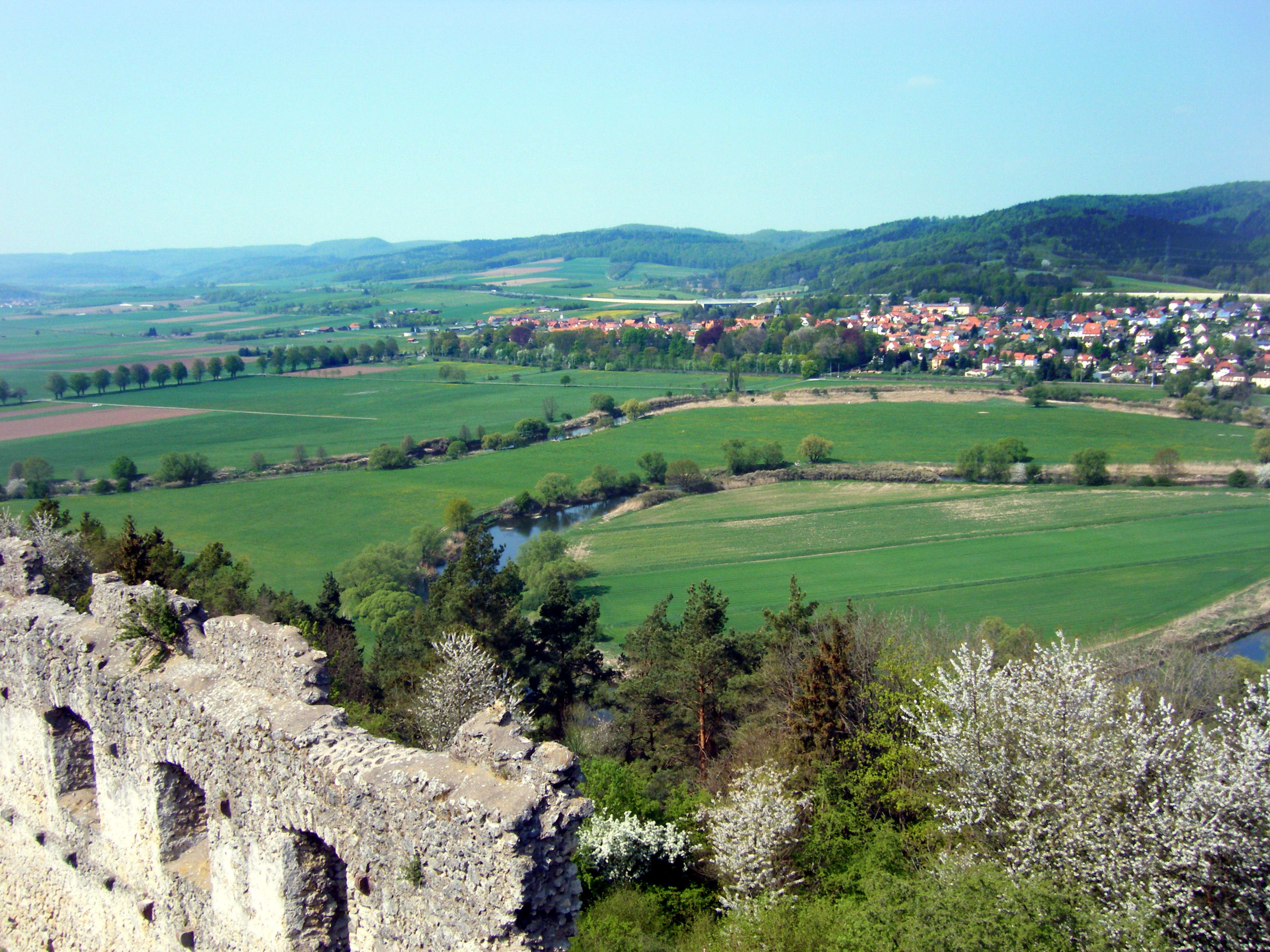 Naturschutzgebiet Werraaue von Herleshausen, WDPA ID 555520290. Blick von der Ruine Brandenburg auf die Werraschleifen bei Herleshausen.